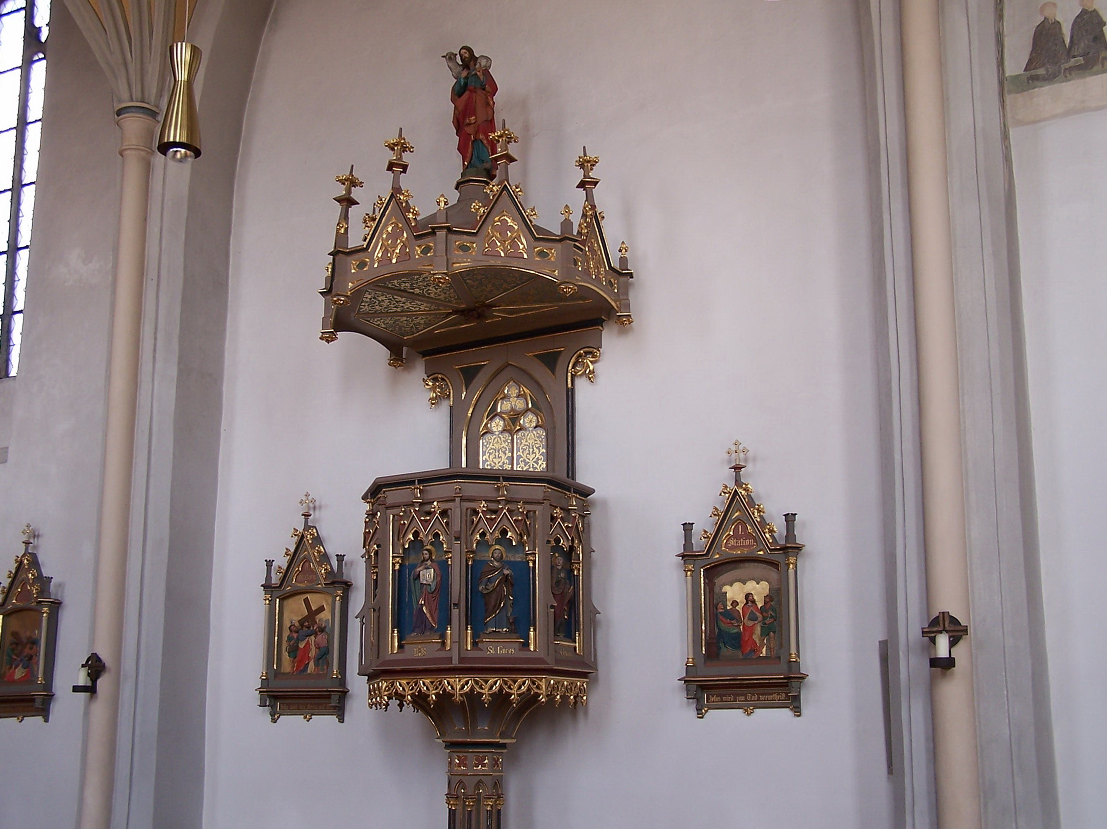 Ergolding, Lindenstraße 94. Katholische Kirche St. Peter und Paul. Saalkirche, spätgotische Anlage, zweiten Hälfte 15. Jahrhundert, Südseite mit Turm älter, Gliederung durch Streben und umlaufenden Dachfries, südseitig Chorflankenturm mit Geschossgliederung, Achteckaufsatz und Spitzhelm. Innenraum mit netzförmig figuriertem Rippengewölbe. Neugotische Einrichtung. Neogotische Kanzel. In den Feldern Relieffiguren der vier Evangelisten und von Jesus. Auf dem Schalldeckel Figur des Guten Hirten.